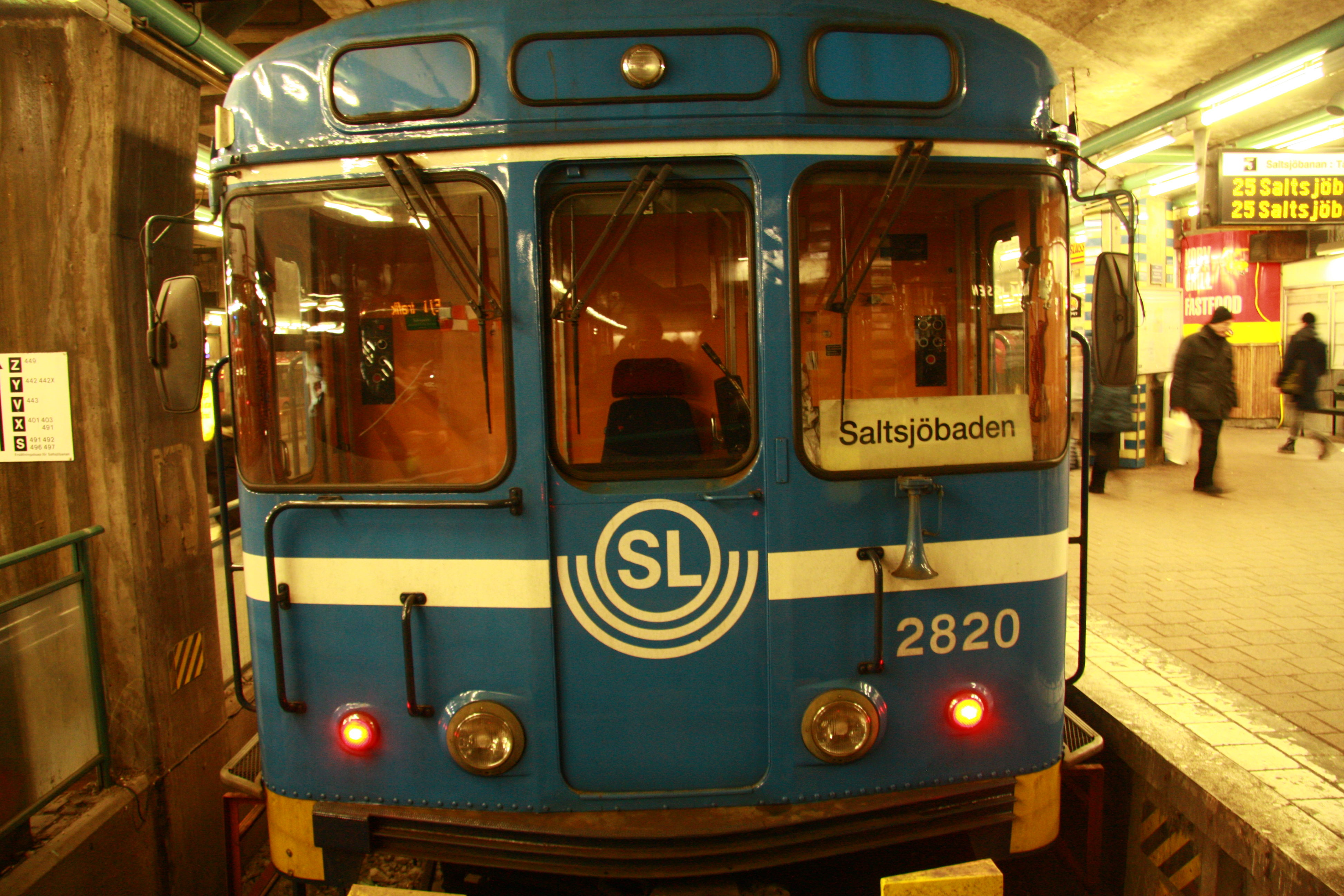 C11 2820 är permanent sammankopplad med motorvagn C10 2819. Fotograferad av mig, Markmc, den 14 december 2011.